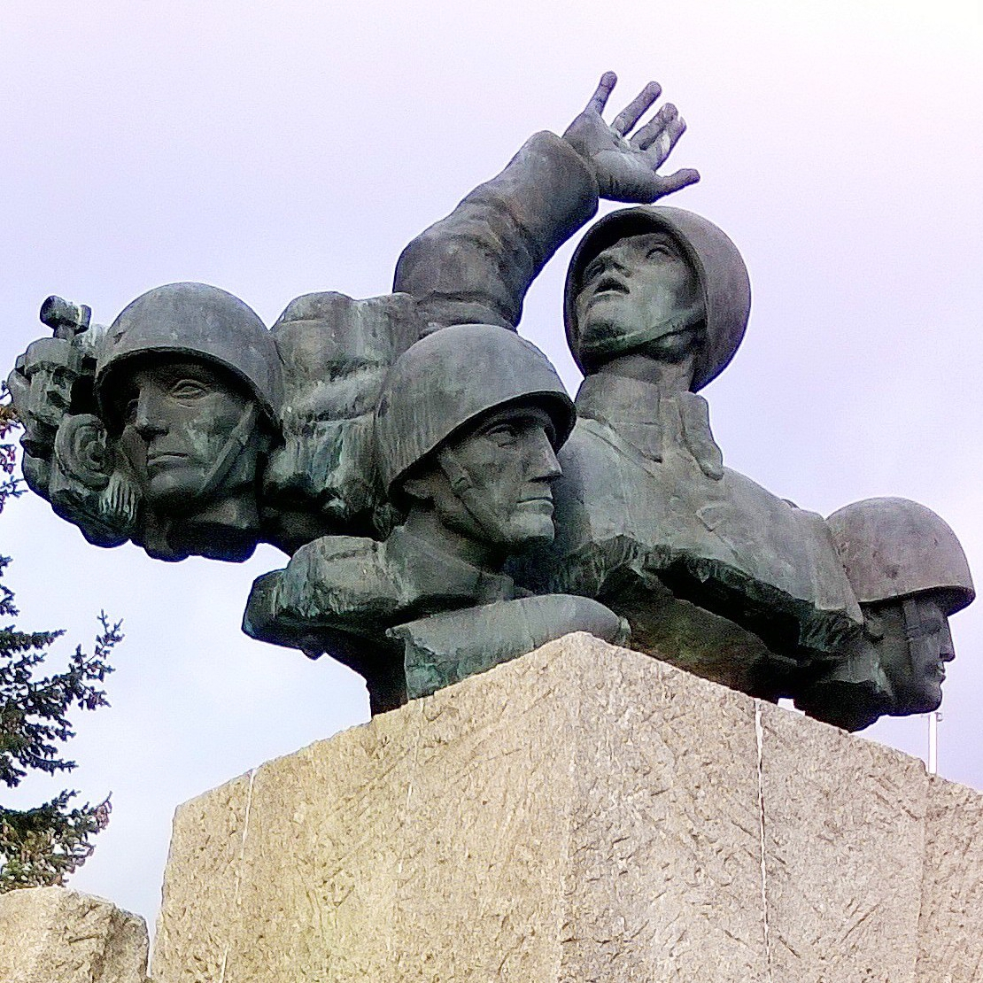 Pomnik Artylerii Polskiej w Toruniu